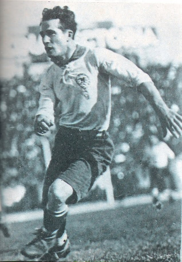 Guillermo Stábile jugando para Huracán